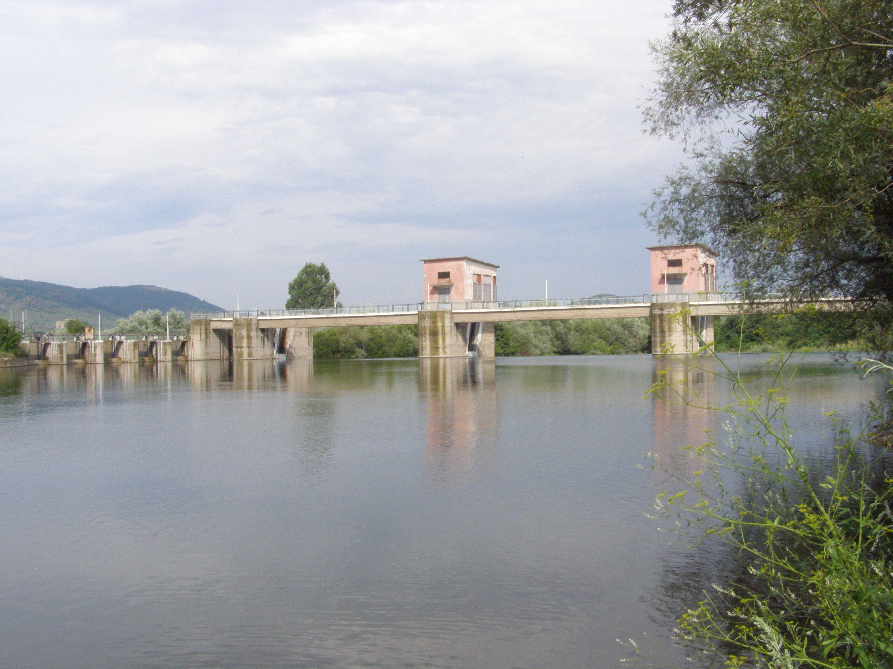 Бента се намира на средното течение на р.Тунджа, край с.Бинкос и се използва за напояване на земите в близките села.